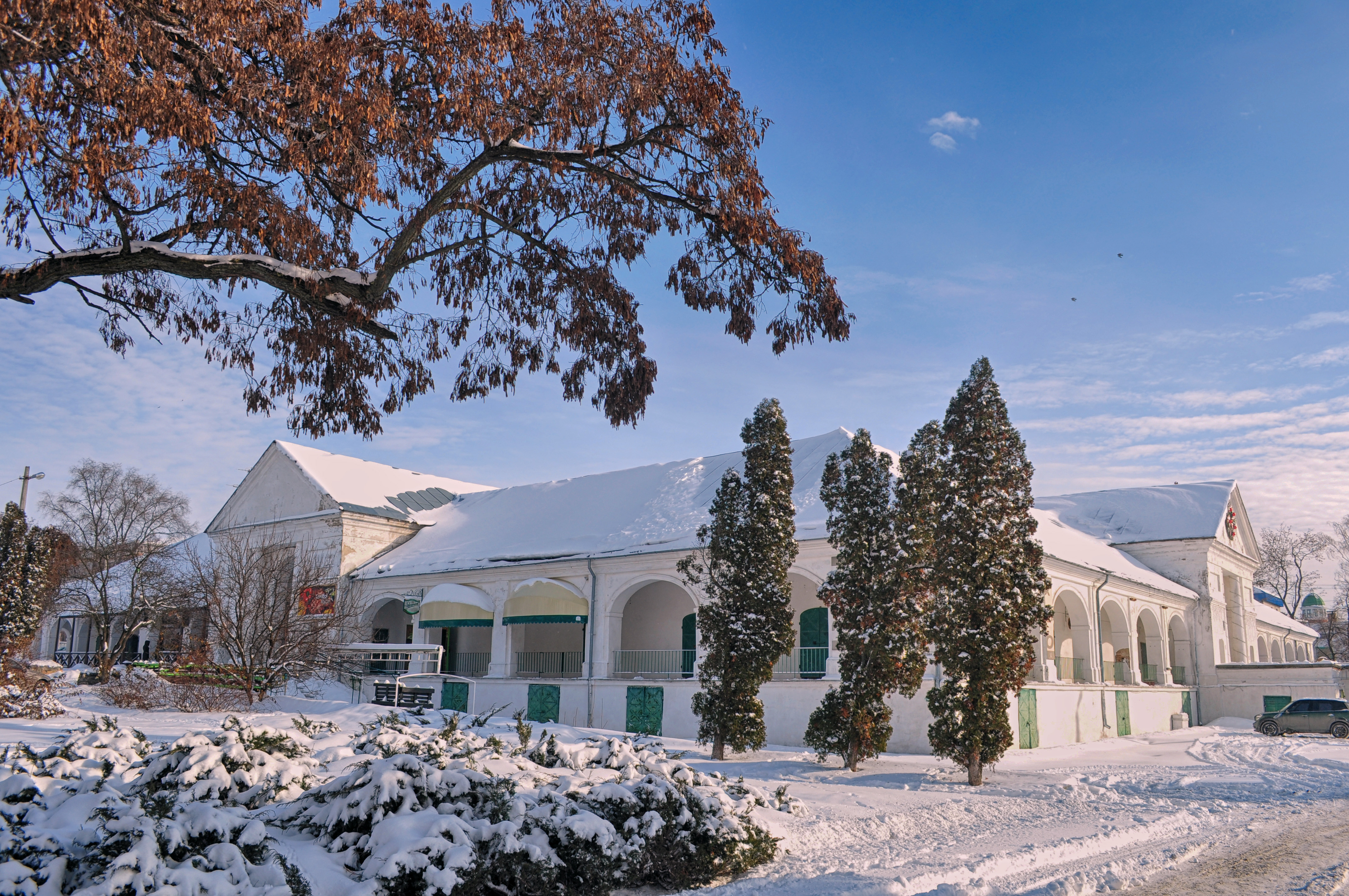 Торгові ряди (мур.), Біла Церква, Торгова площа